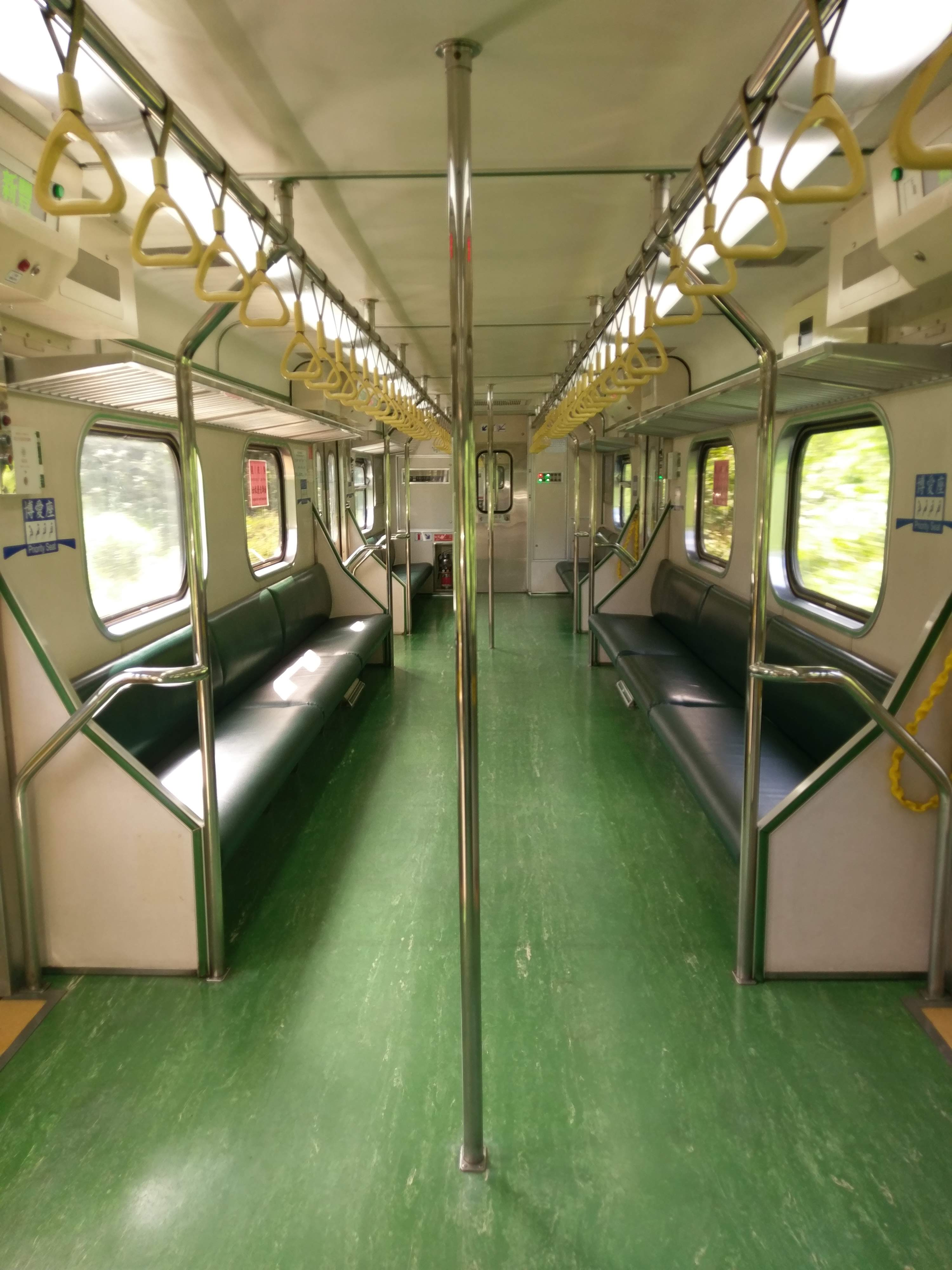 中文（台灣）: 台鐵EMU500型電聯車的車內